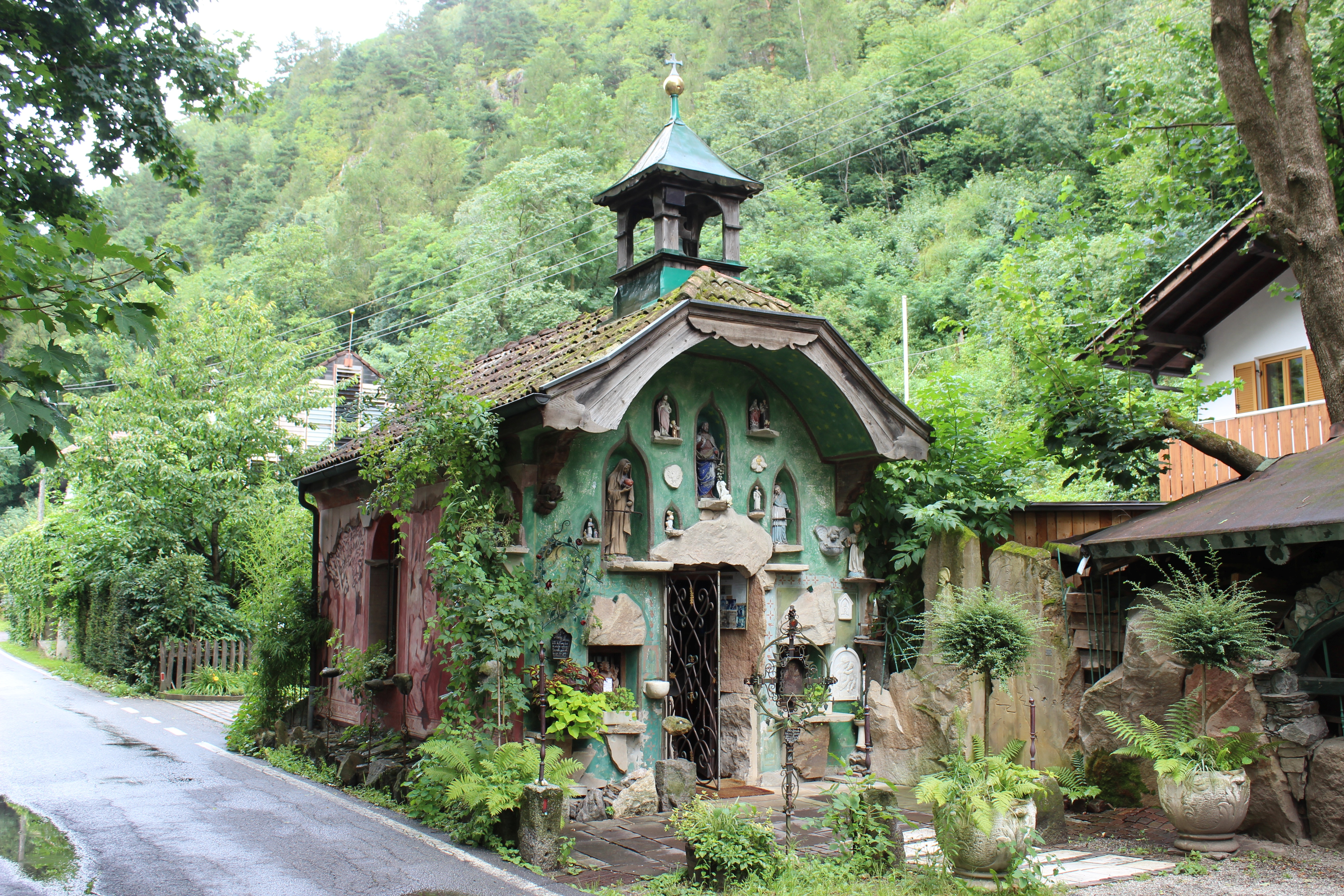 Kapelle "Bad Egart" in der Gemeinde Partschins